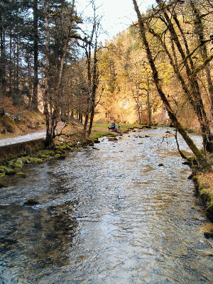 Le Cirque de Consolation reçoit de nombreuses sources et cascades, dont le Dessoubre.